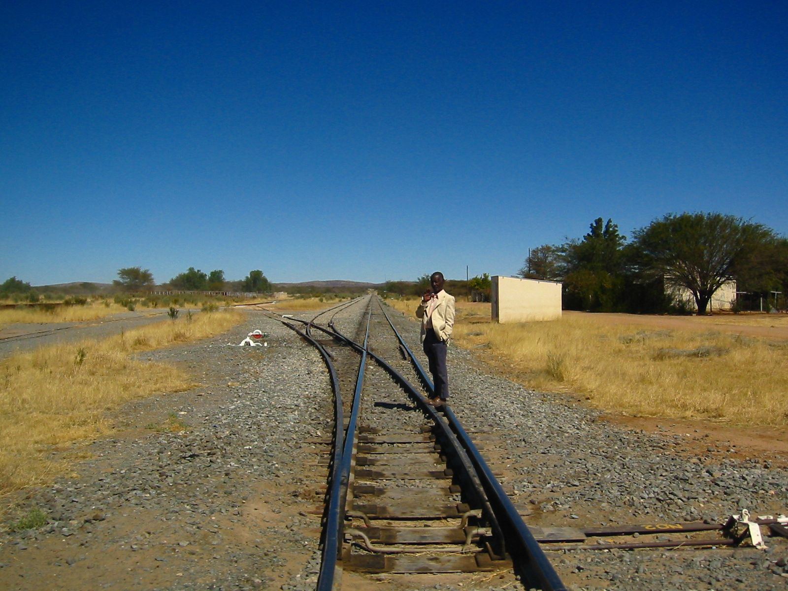 Kalkfeld, Namibia